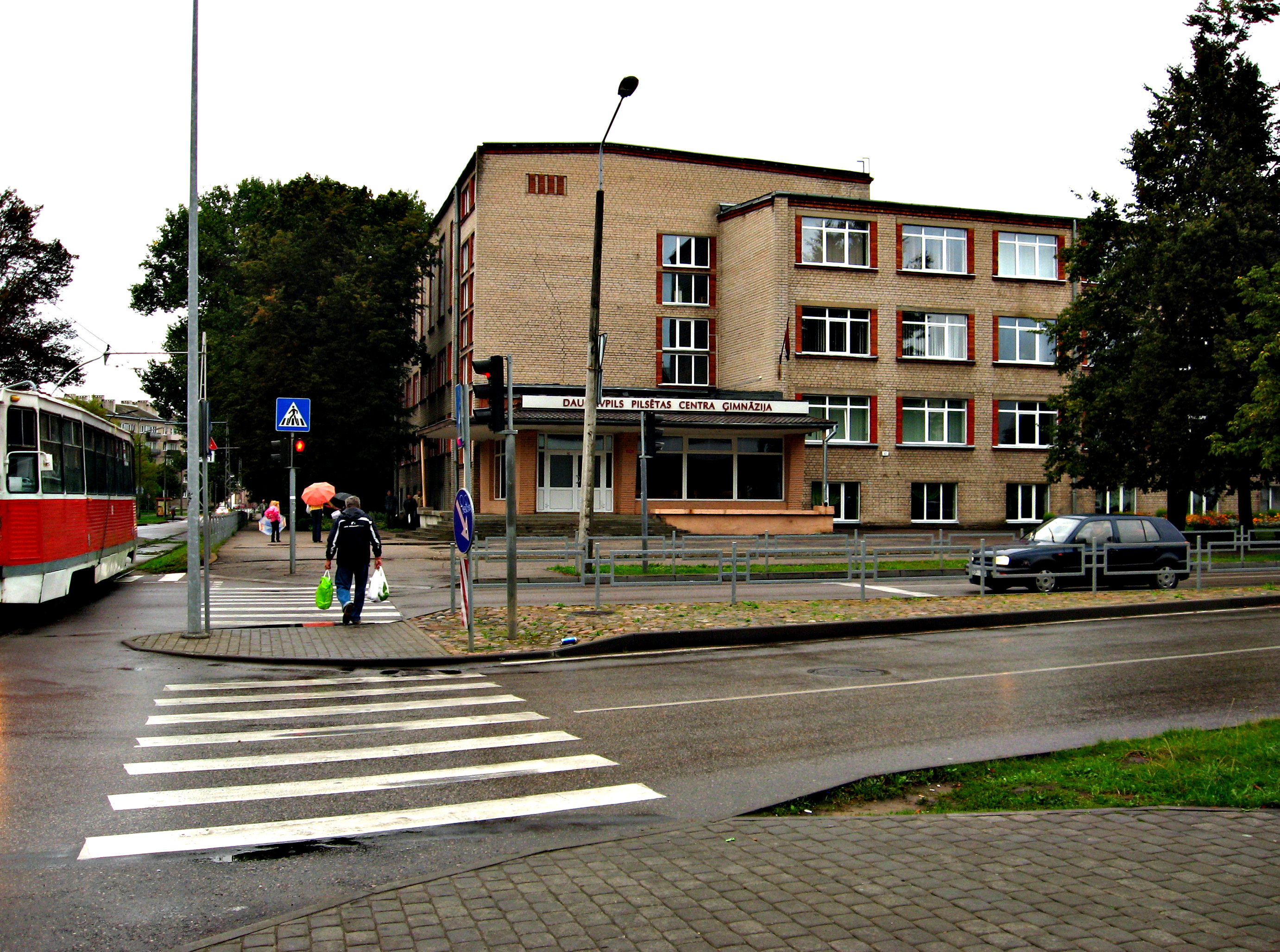 Daugavpils Pilsētas centra ģimnāzija